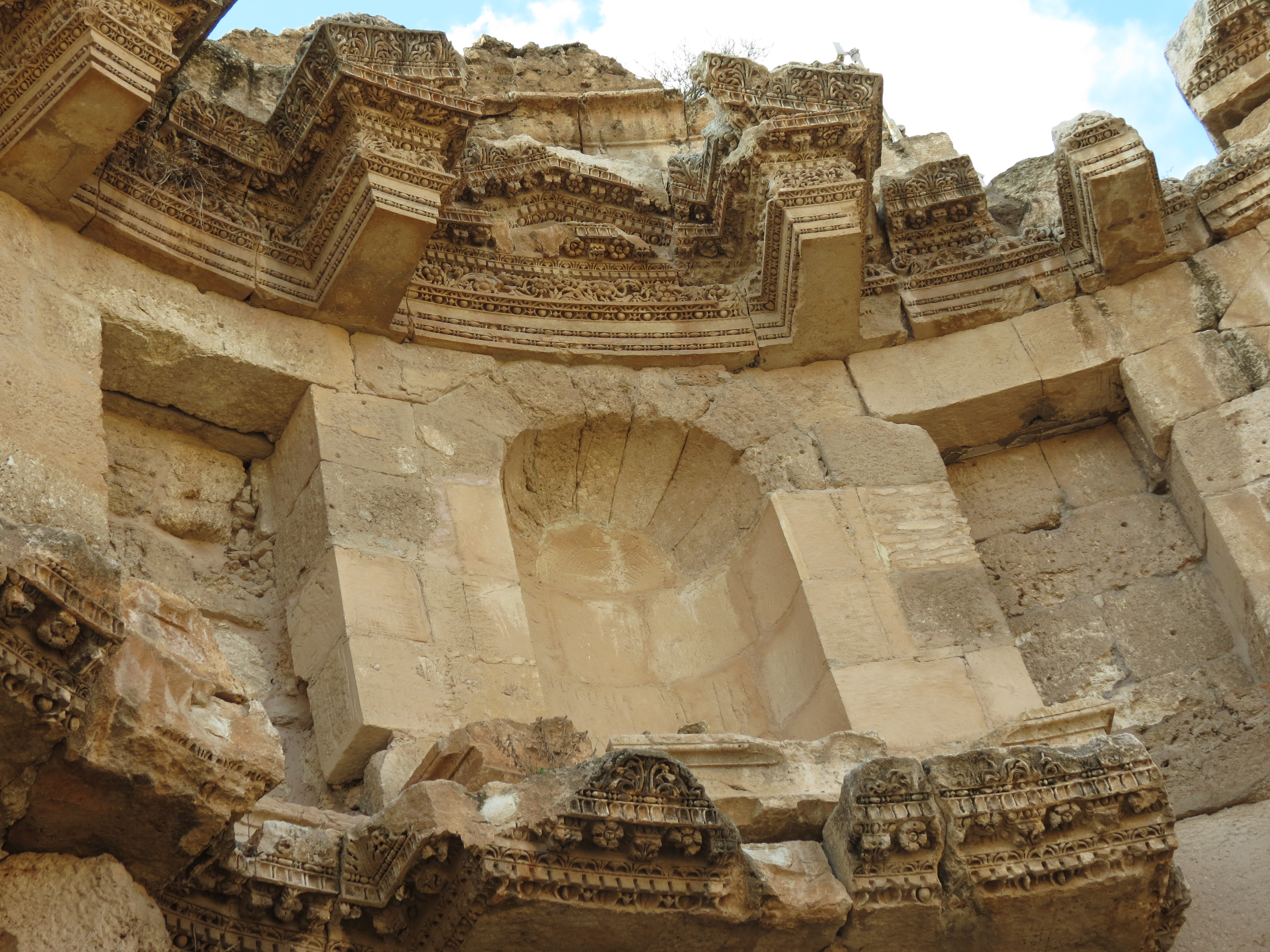 Une vue de la Jordanie.